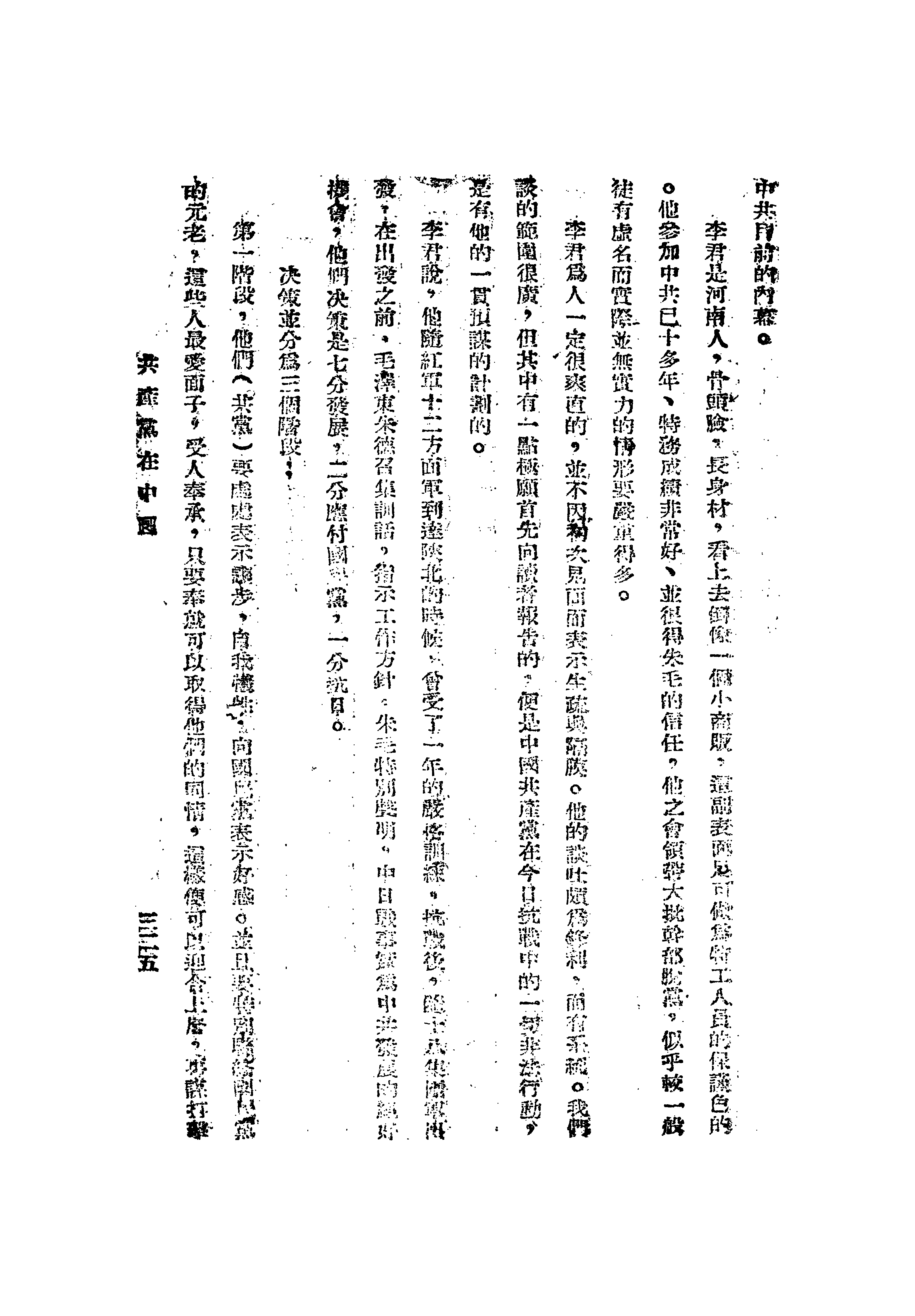 中文（台灣）: 李法卿訪問記，述及共產黨一分抗日部分。依據 經濟部商業司營業登記之查詢結果，華嚴出版社已於2004年6月歇業(終止營業) 承上，根據中華民國著作權法第42與第43條規定，屬於自由利用範圍。 本書公開出版日為1943年7月。